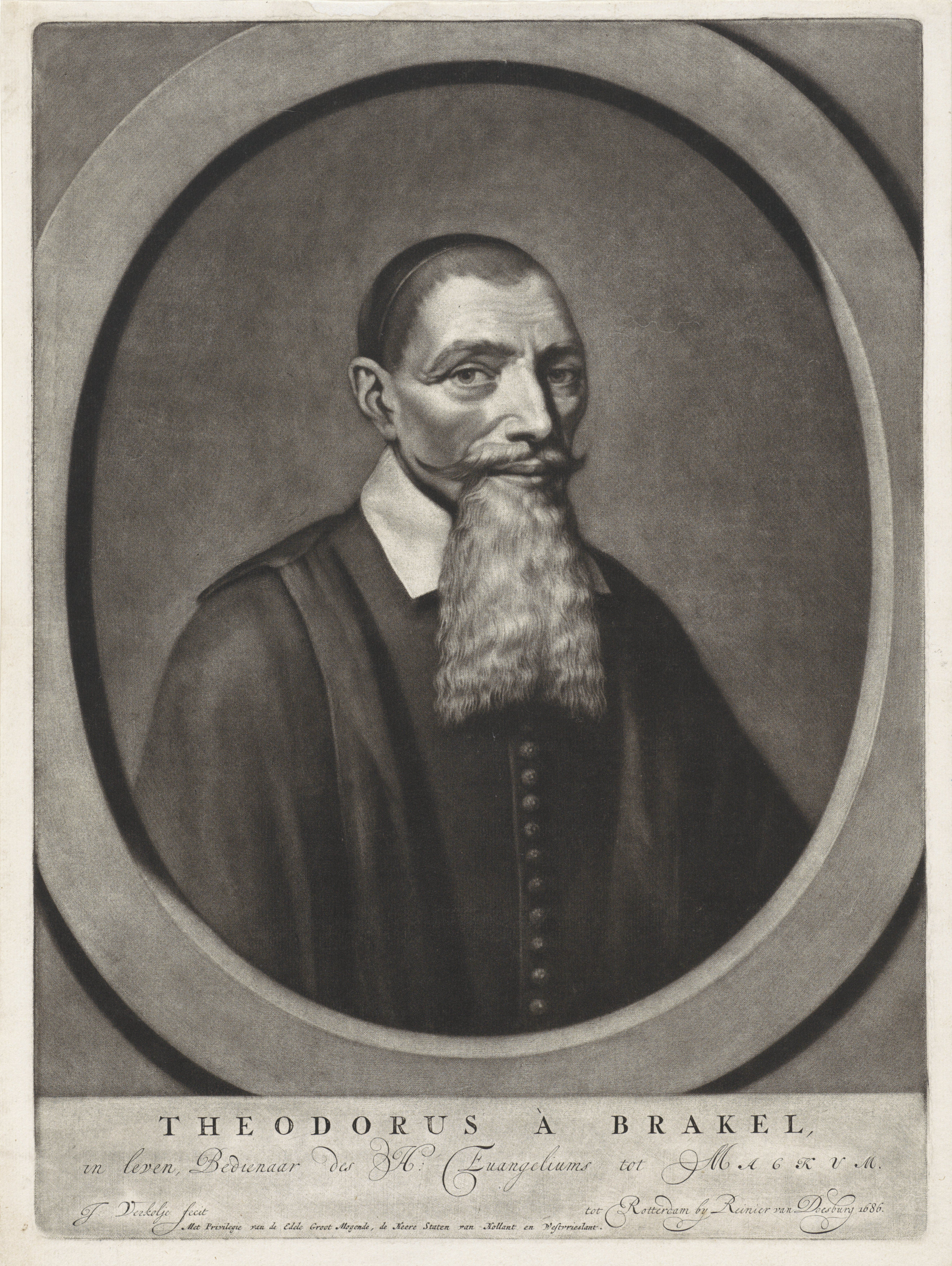 Portret van de predikant Theodorus a Brakel Objectnummer RP-P-1911-162 Catalogusreferentie Hollstein Dutch 24-1(2) Prentmaker: Jan Verkolje (I) (vermeld op object) Uitgever: Reinier van Doesburg (vermeld op object) Rotterdam, 1686